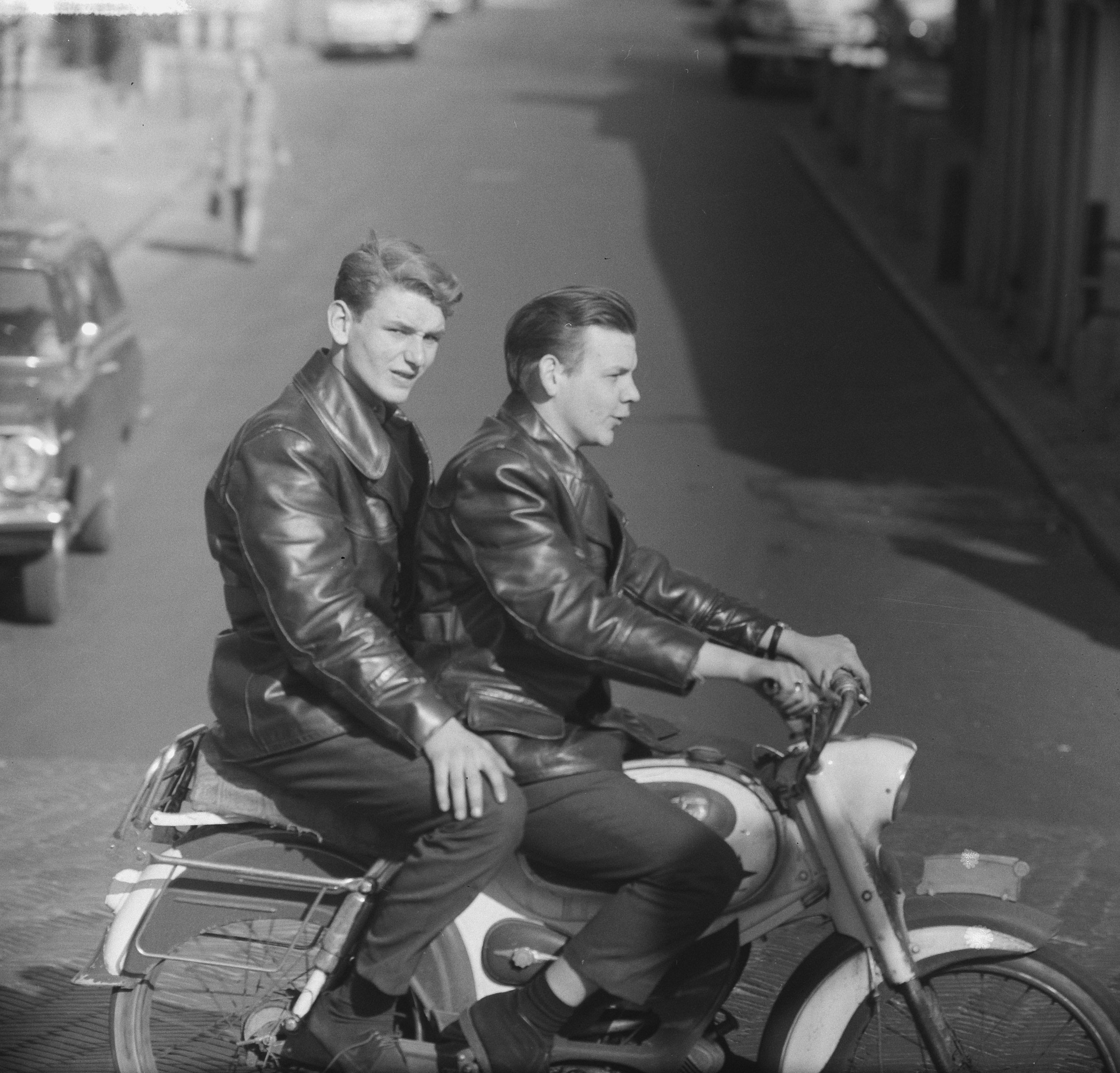 Collectie / Archief : Fotocollectie Anefo Reportage / Serie : [ onbekend ] Beschrijving : Nozems op bromfietsen Datum : 7 april 1965 Trefwoorden : bromfietsen, nozems Fotograaf : Nijs, Jac. de / Anefo Auteursrechthebbende : Nationaal Archief Materiaalsoort : Negatief (zwart/wit) Nummer archiefinventaris : bekijk toegang 2.24.01.03 Bestanddeelnummer : 917-6119